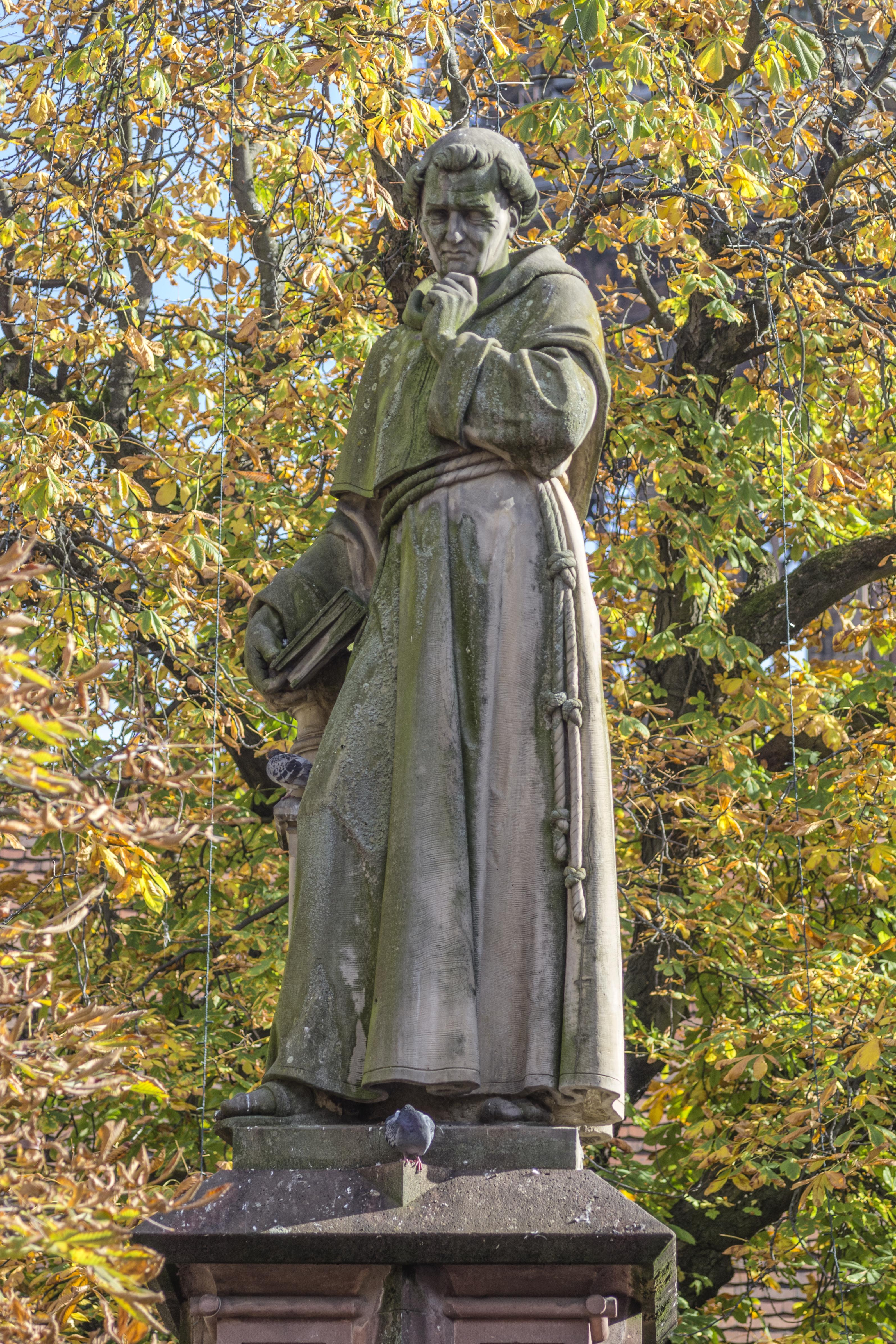 Bilder aus der Stadt Freiburg im Breisgau